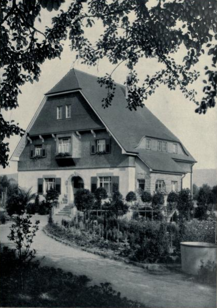 Haus Ströble, Bauwerk von Beutinger und Steiner, Heilbronn, Sontheimer Str. 105/1 bzw. Lenbachweg 1